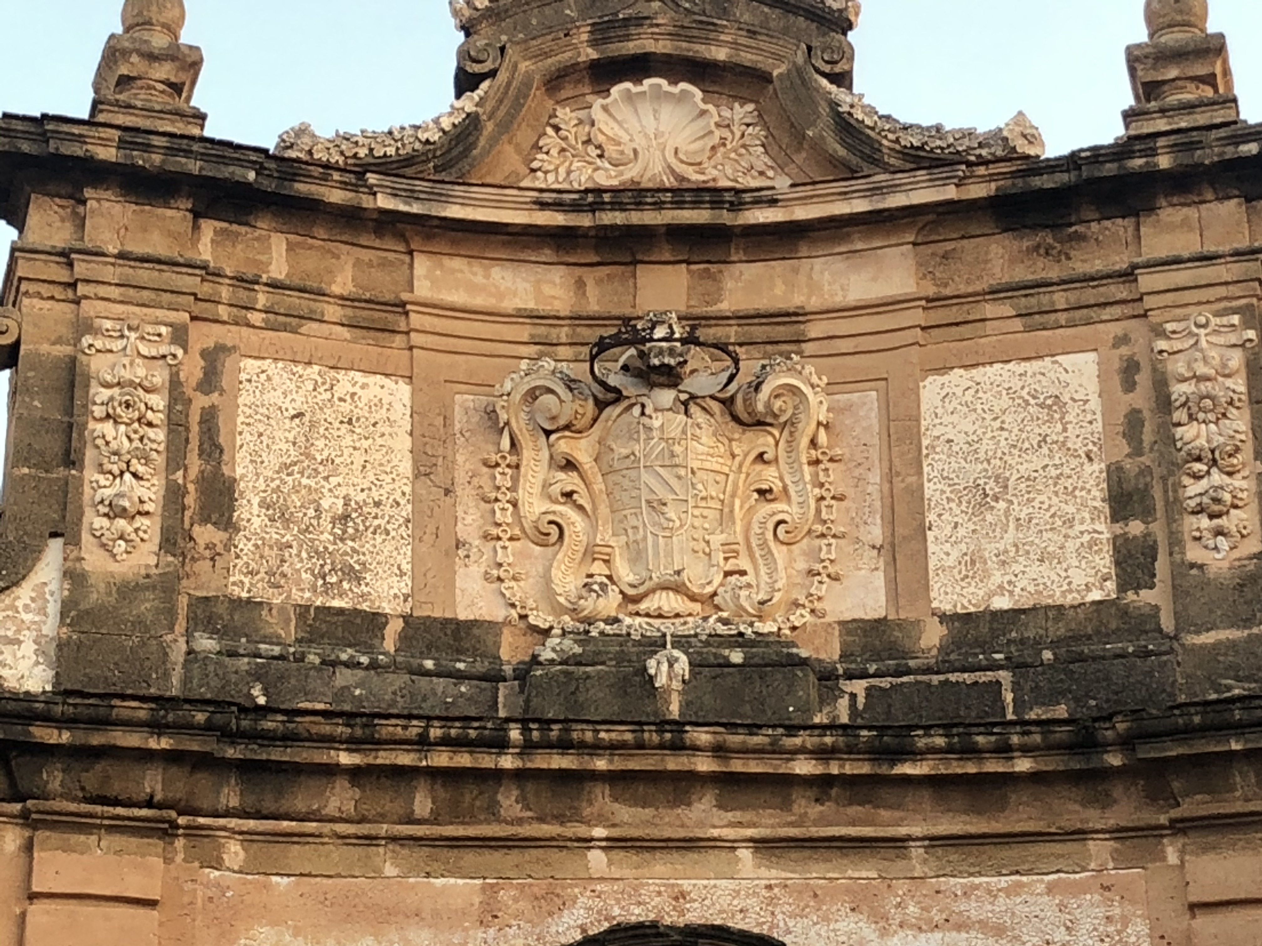 Stemma